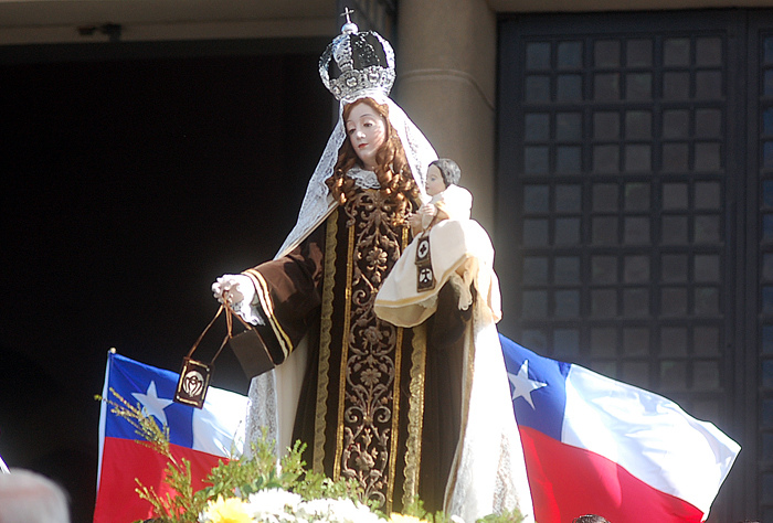 En el Templo Votivo de Maipú se celebra el Día de Nuestra Señora del Carmen. 16 julio 2010.